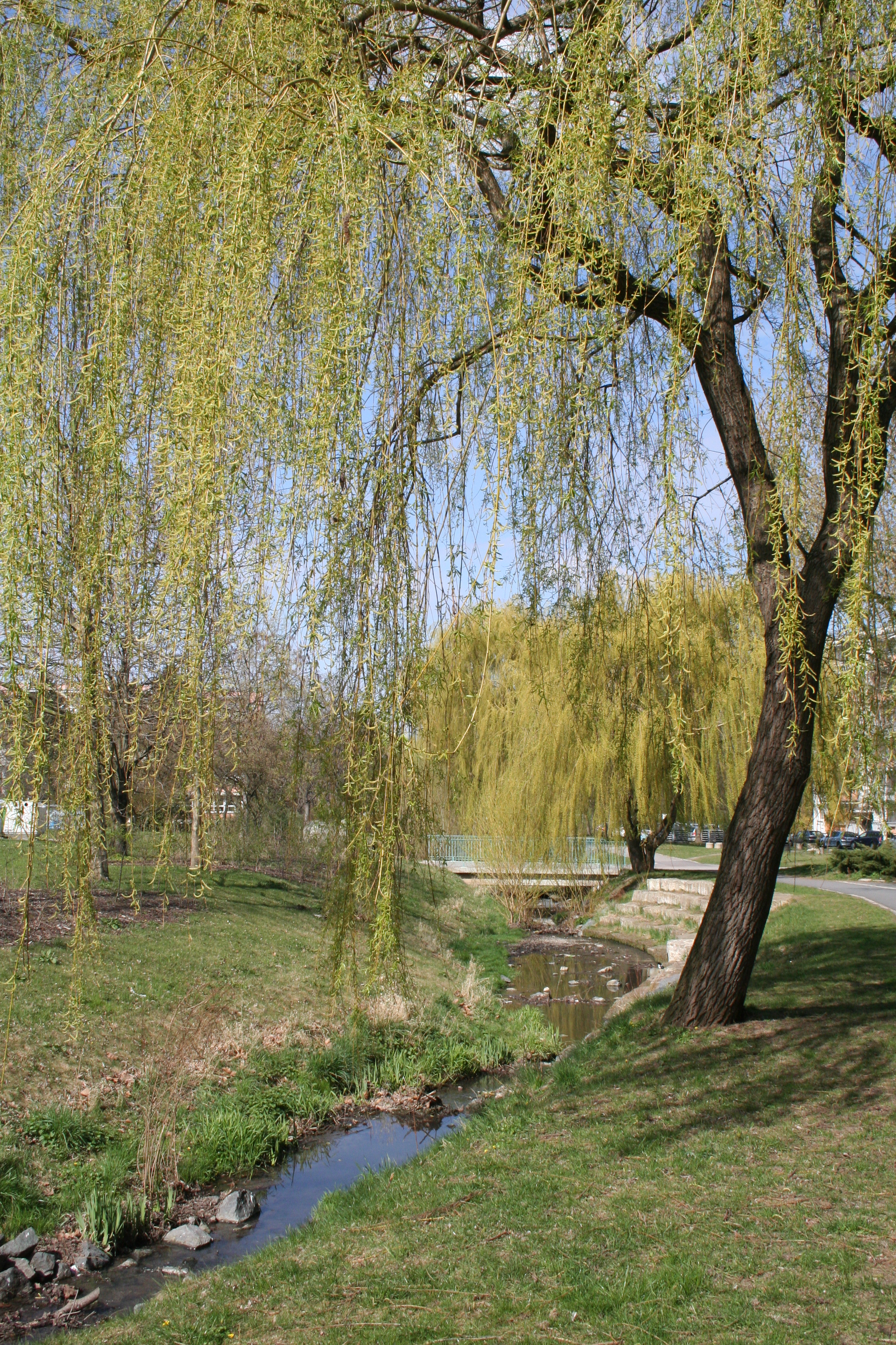 Gorbitzbach, Am Gorbitzbach, Dresden